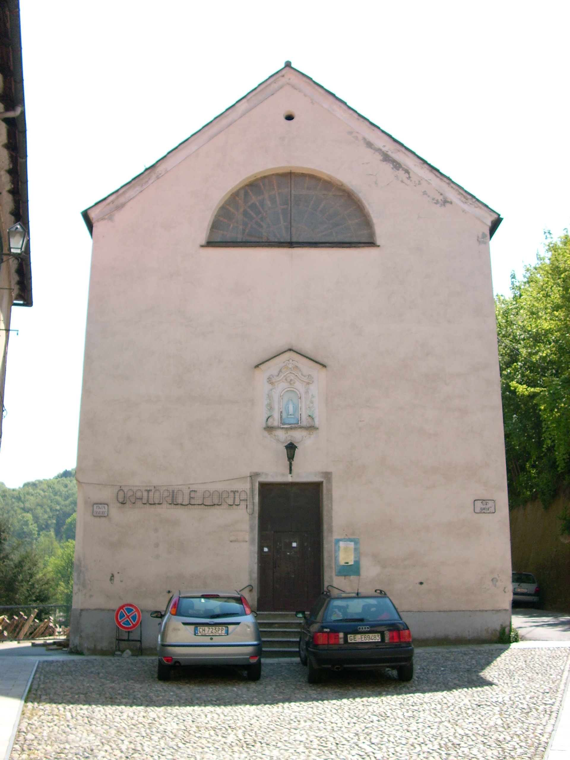 Oratorio Fuori Porta di Masone, Liguria, Italia